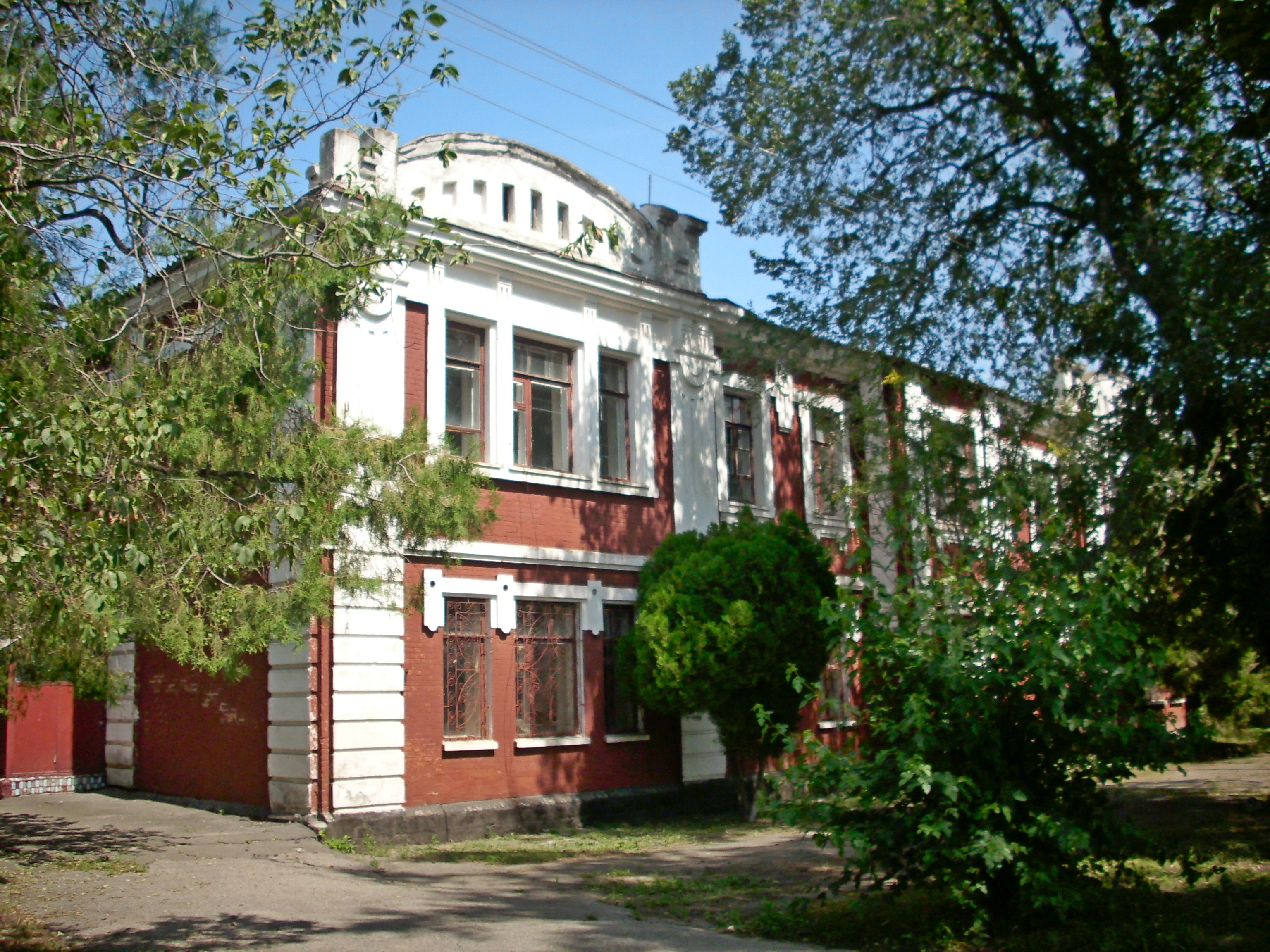 Колишній будинок машиністів в Роздільній